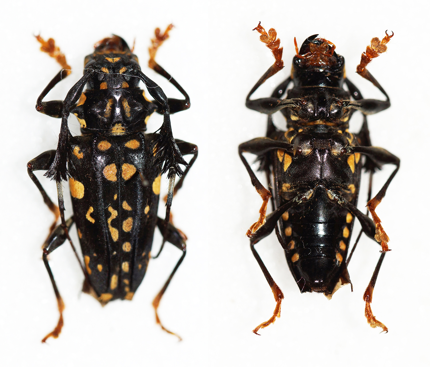 Bates,1861 Sex: ? Data: 06-2012 - Rio Venado - Satipo - Junin - Peru Size: 16mm